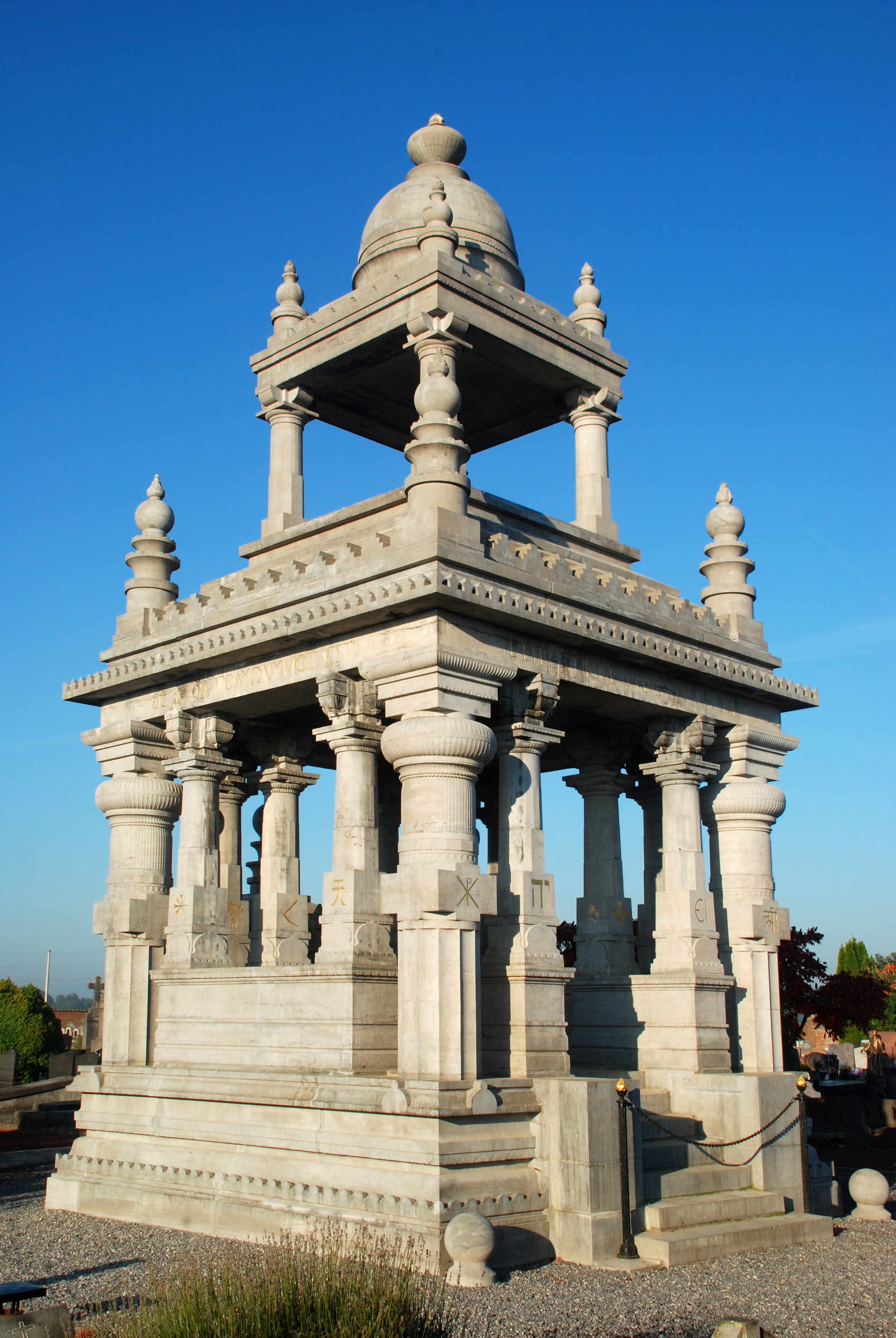 Belgique - Brabant wallon - Court-Saint-Etienne - Mausolée Goblet d'Alviella